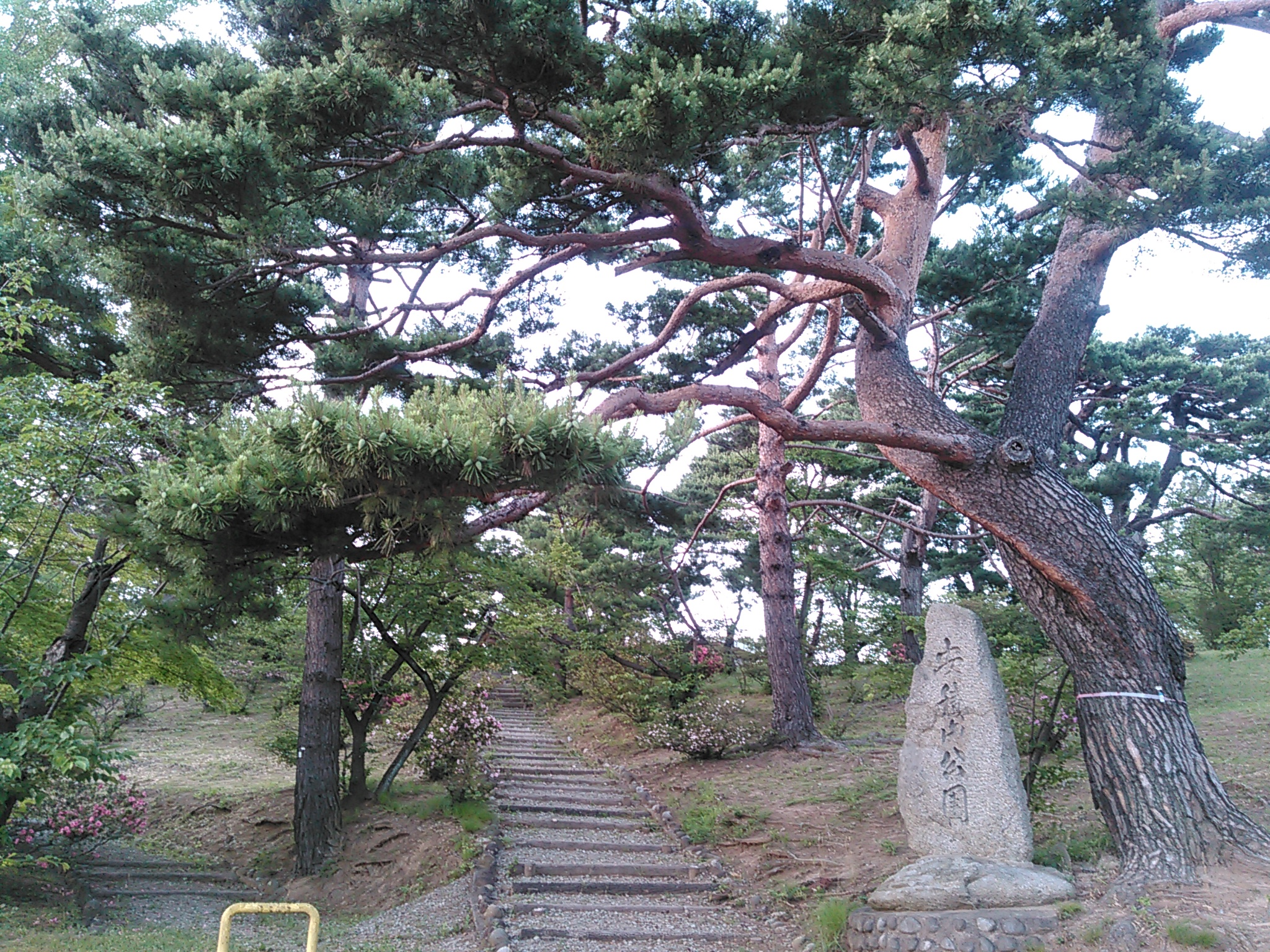 安積山公園